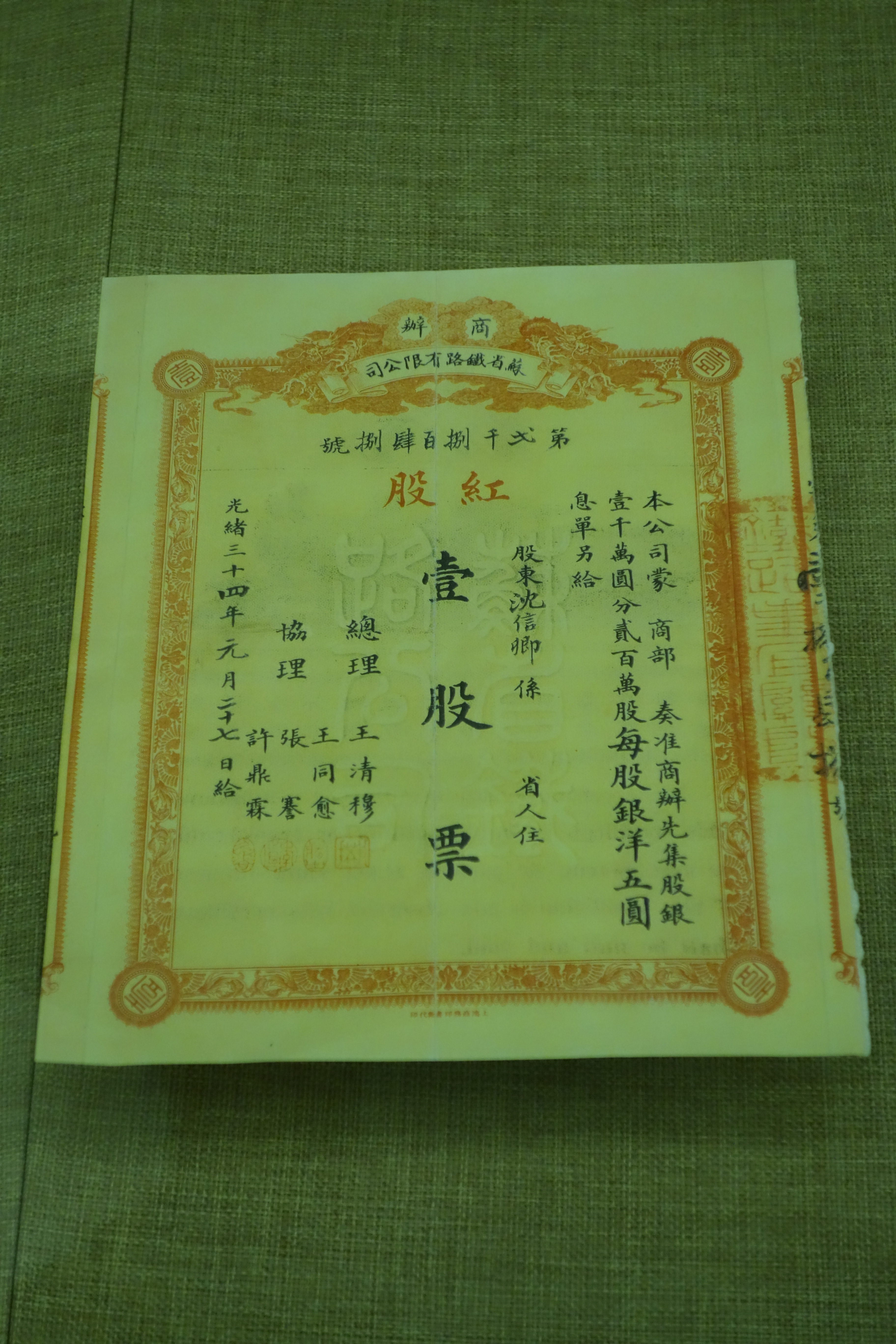 中国铁道博物馆藏苏省铁路公司股票